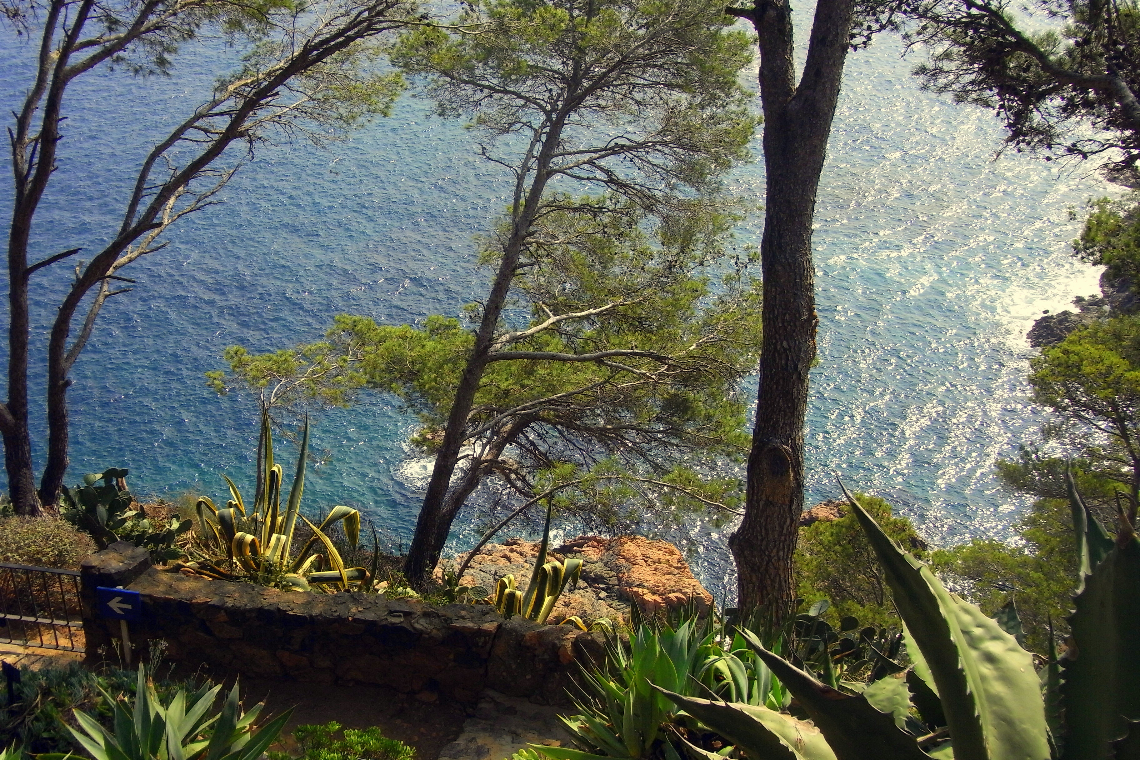 CALELLA de PALAFRUGELL - Jardí de Cap Roig